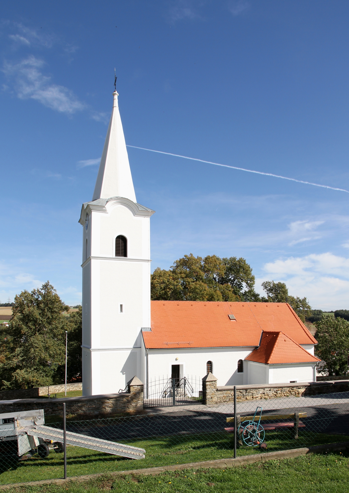 Katholische Pfarrkirche hl. Nikolaus in der burgenländischen Marktgemeinde Kobersdorf. Ein barocker Bau aus dem Jahr 1728, der in Höhenlage errichtet wurde und von einer Wehrmauer umgeben ist.